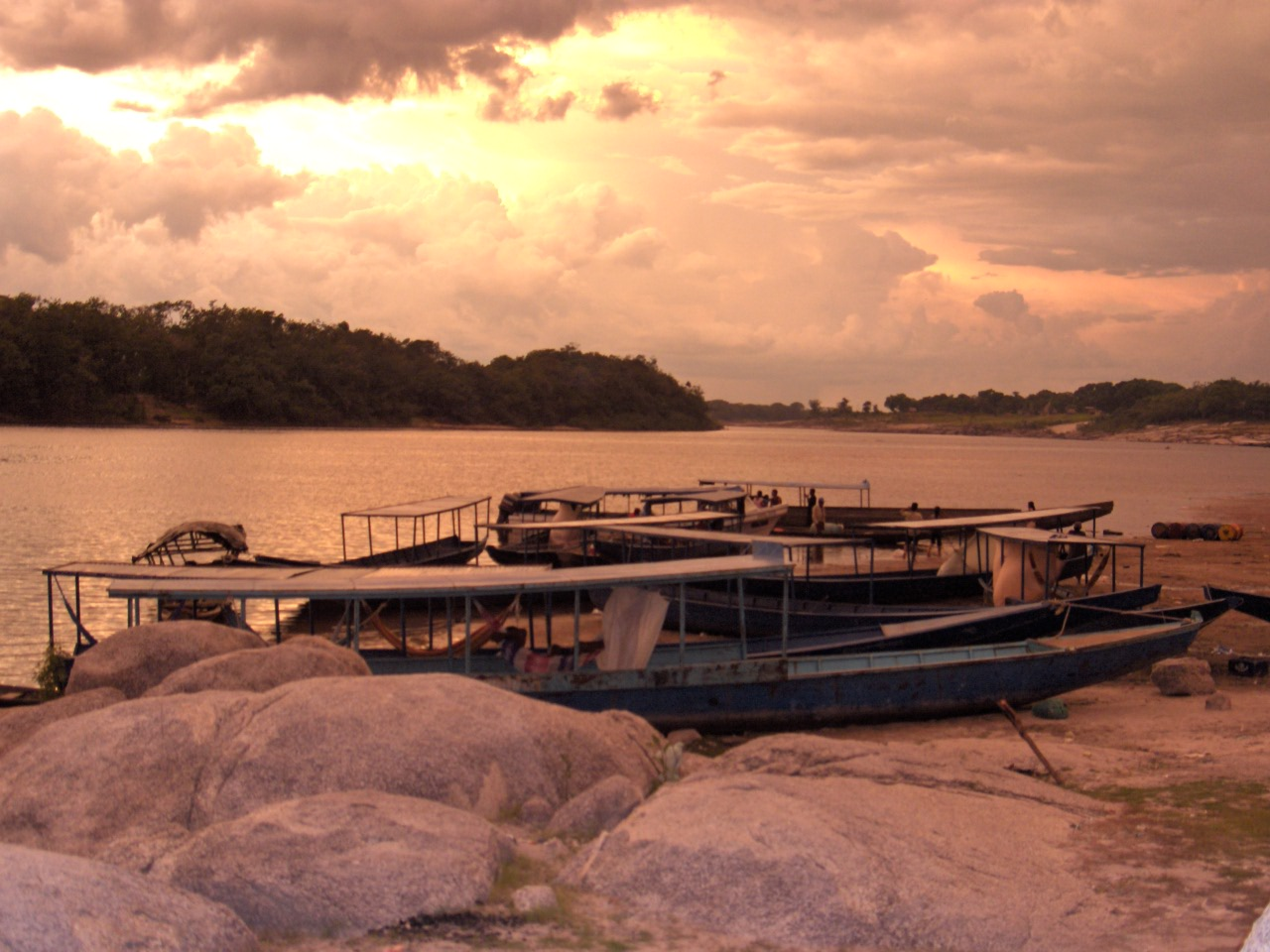 Puerto de San Fernando de Atabapo. Las embarcaciones son conocidas como "voladoras"